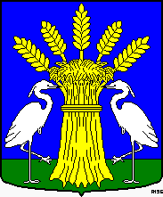 Gemeentewapen Heerhugowaard